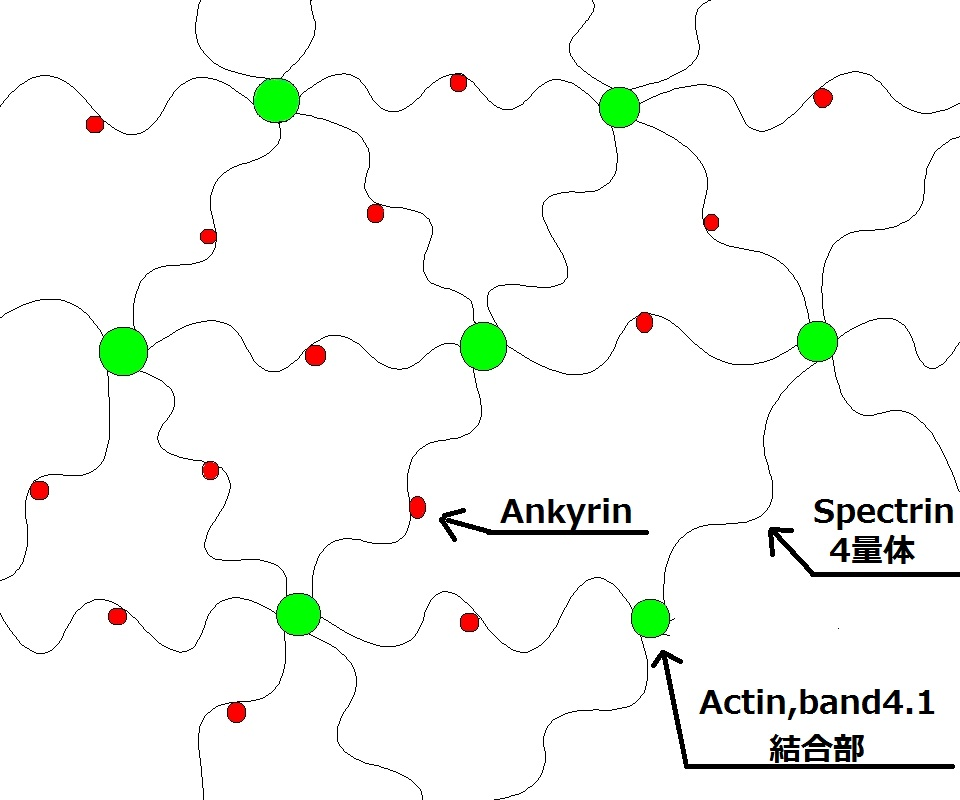 赤血球膜骨格のラフな画